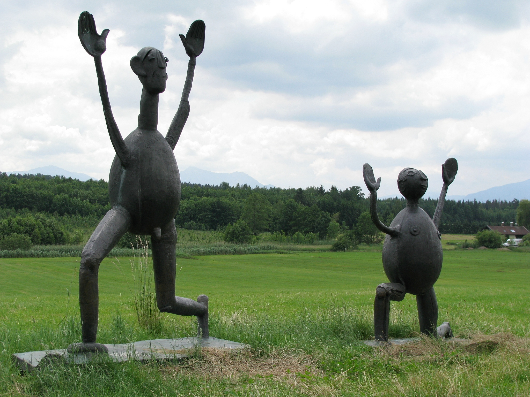 Teil einer dreiteiligen Skulpturengruppe von Heinrich Kirchner in Pavolding, Landkreis Traunstein